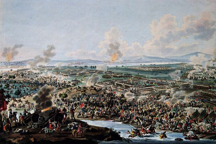 Bătălia de la 14 octombrie 1788 a fost reprezentată de către desenatorul austriac Carl Schütz și gravată în cupru de către Christian von Mechel. Planșa este inclusă în albumul bilingv german-francez „Planșe și planuri ale celor mai memorabile evenimente ale războiului austriecilor și rușilor împotriva turcilor” publicat la Basel, Germania, în anul 1790.(Biblioteca Academiei Române.)